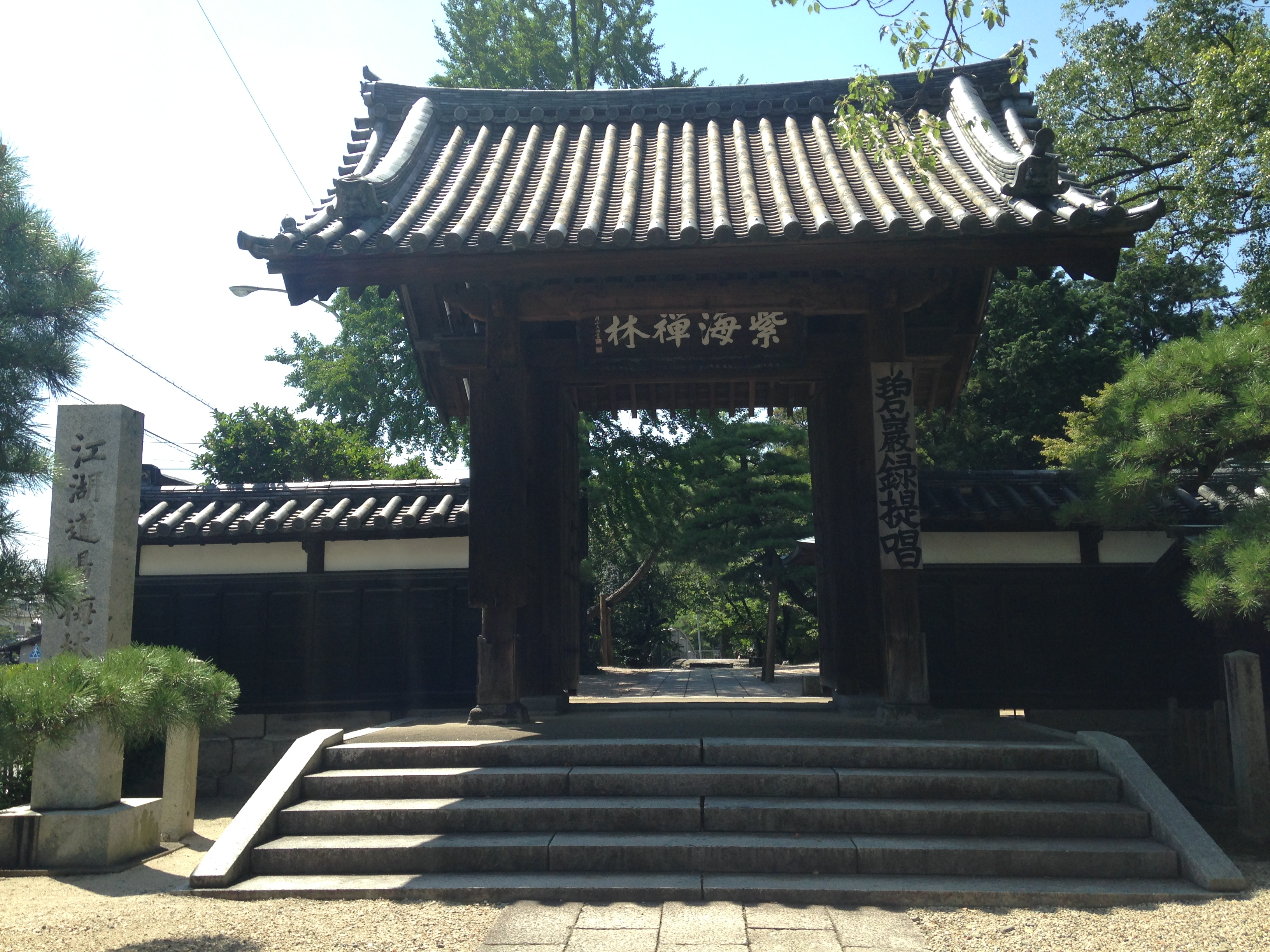 梅林寺の山門